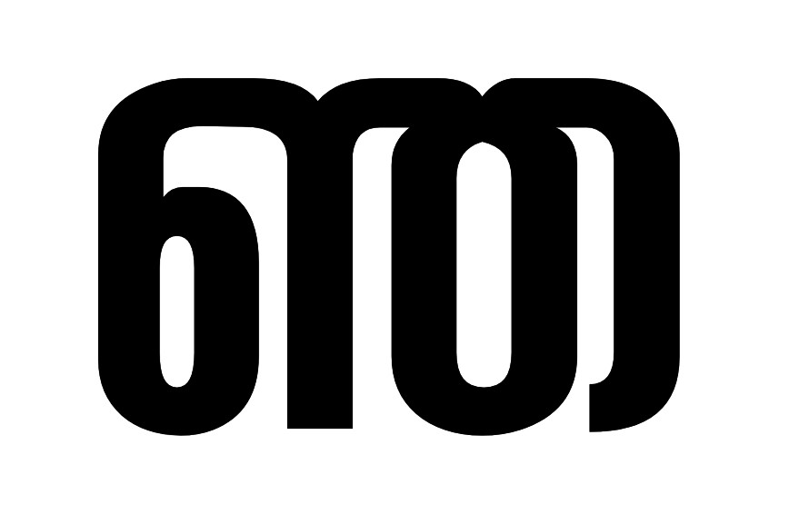 ഞ മലയാളം അക്ഷരം